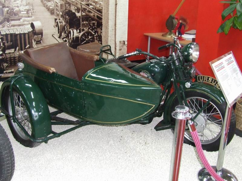 Polish Sokół 1000 motorcycle.